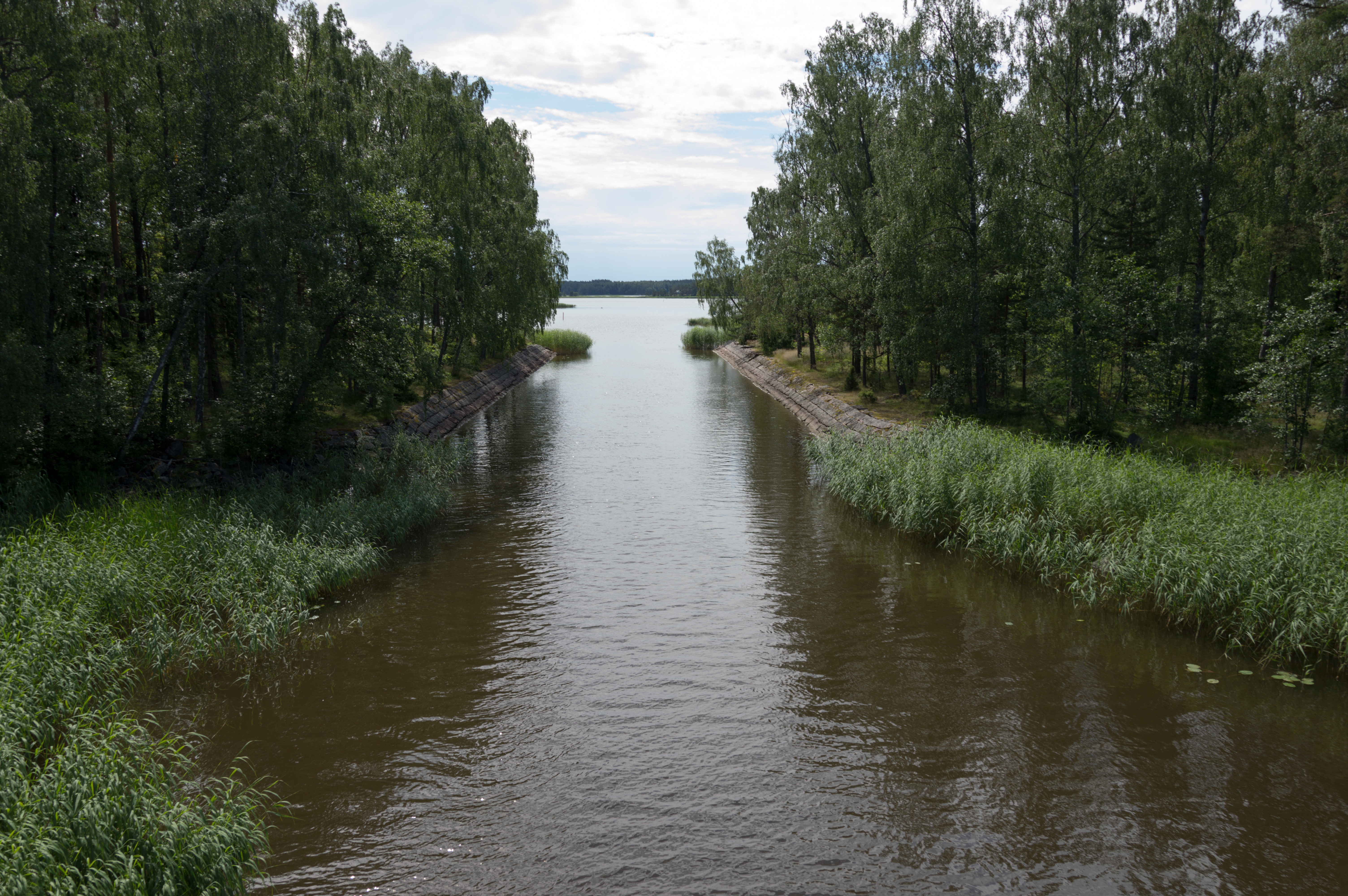 Jumalsundin kanava ruotsinpyhtäällä